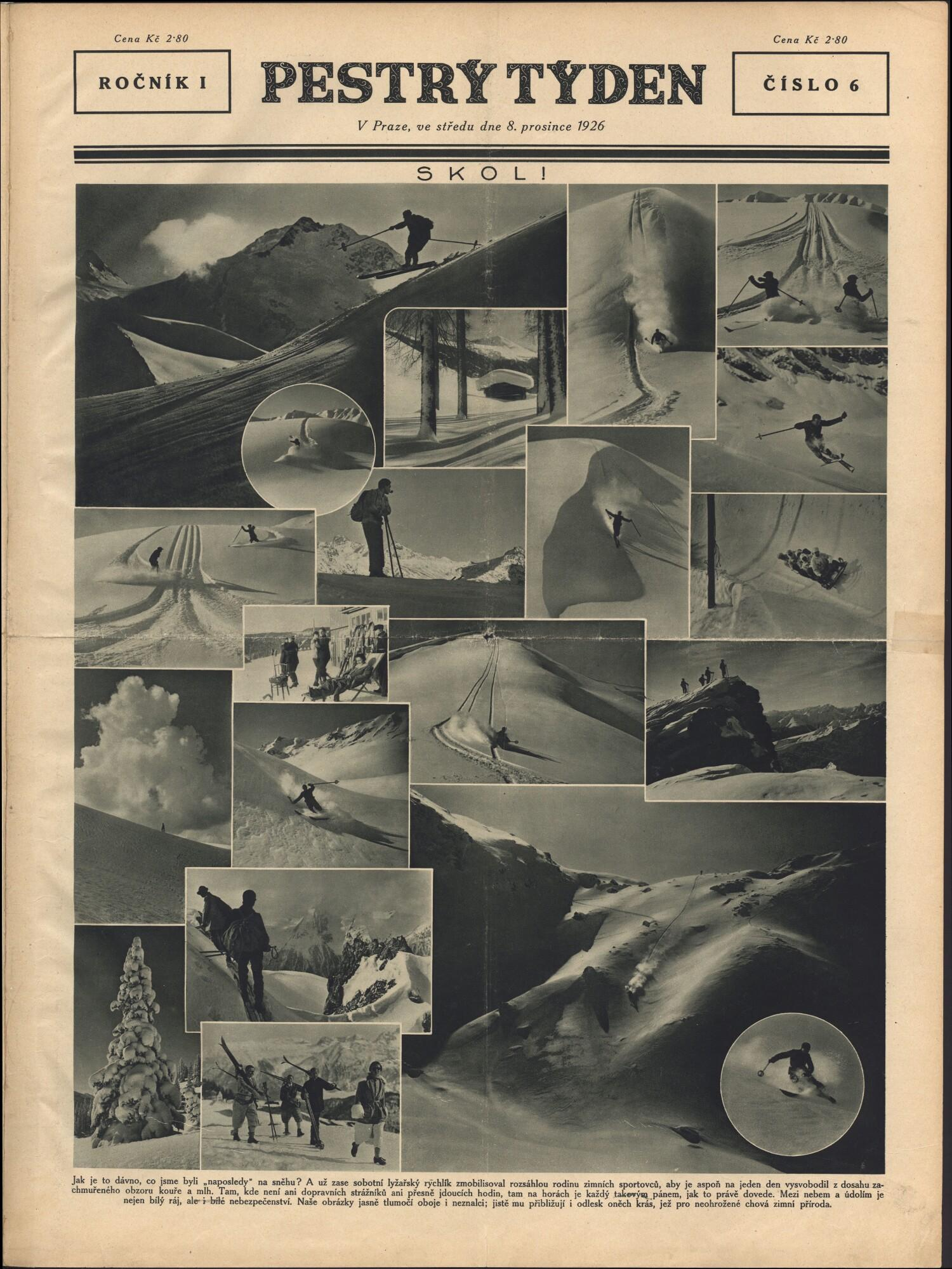 Pestrý týden, 8.12.1926, titulní strana